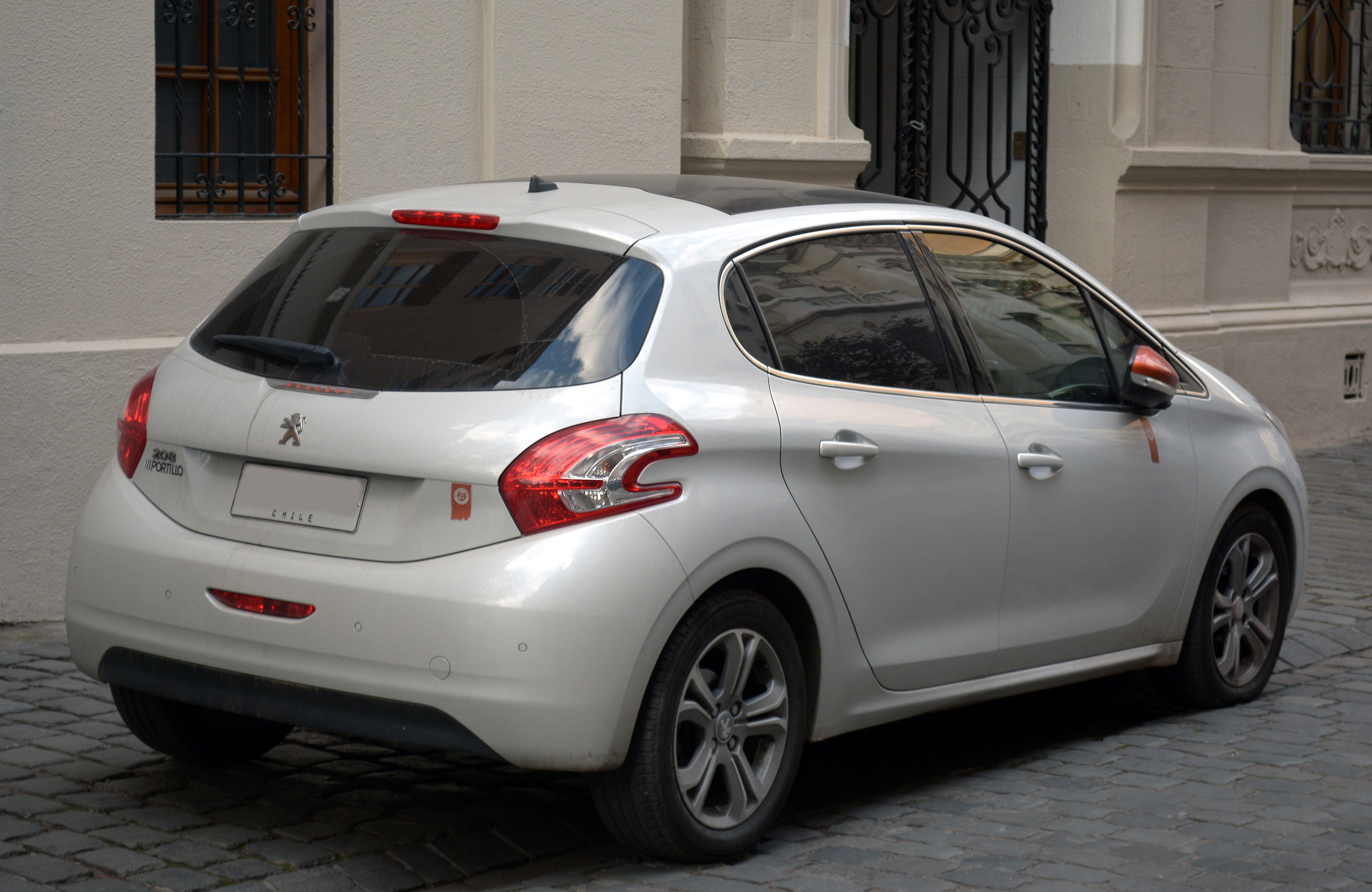 Peugeot 208 1.2 Puretech Roland Garros 2016